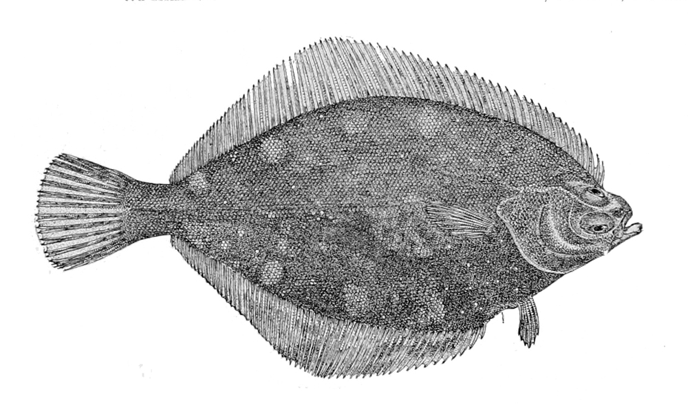 Lepidopsetta bilineata